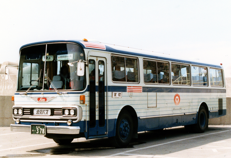 北見バス 日野RV